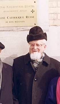 Кирилл Козина